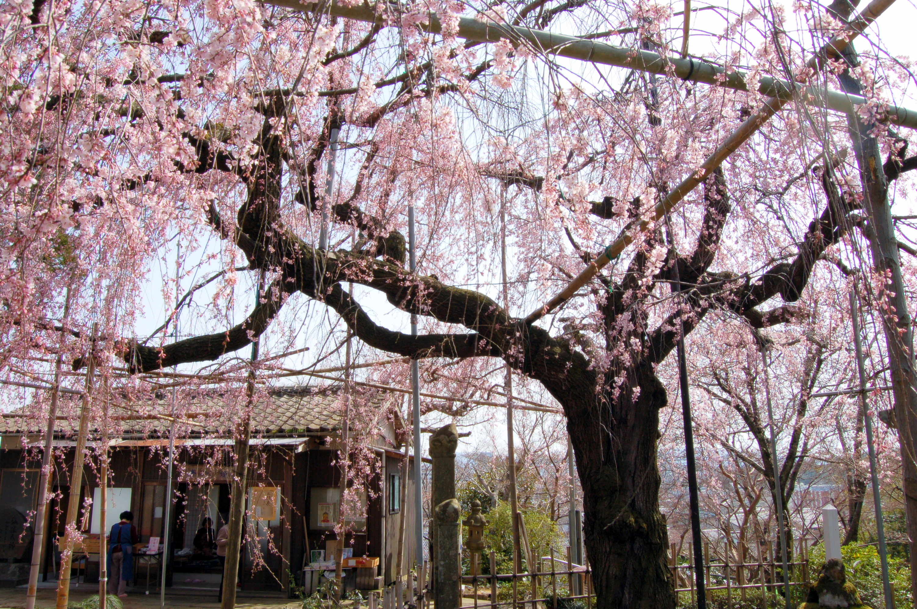 Senju-in Temple in Matsue, Japan